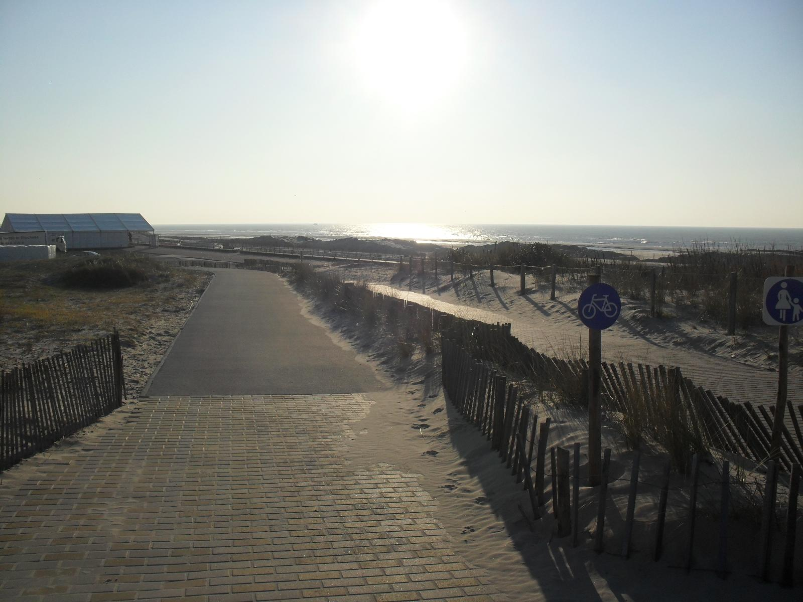 Aménagements Paysagers au niveau de la Jonction Promenade de la Corniche et Parking-Plage Nord - Le Touquet-Paris-Plage